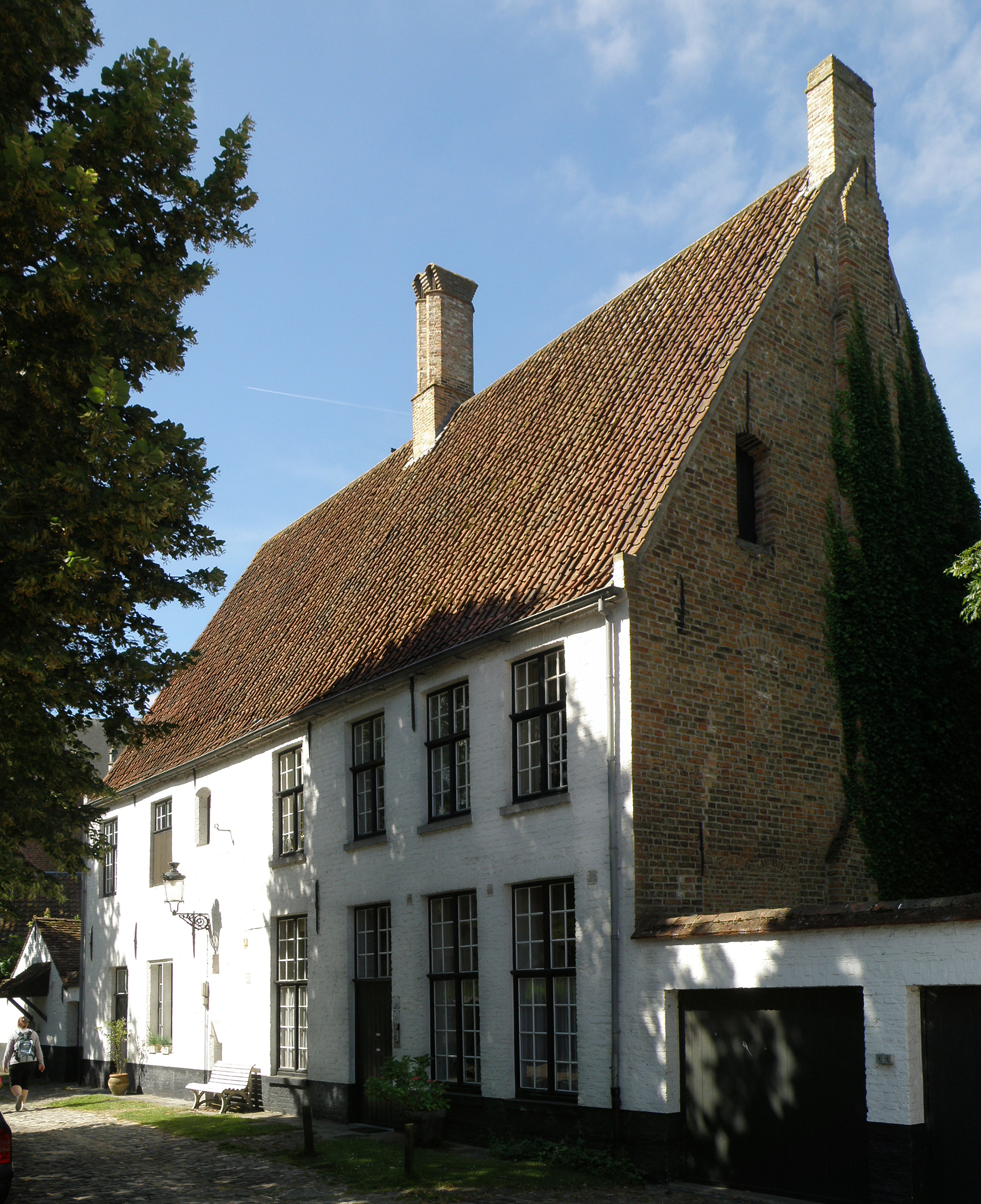 Brugge, Begijnhof. Begijnenhuizen nr. 48 (rechts) & 50 (links).